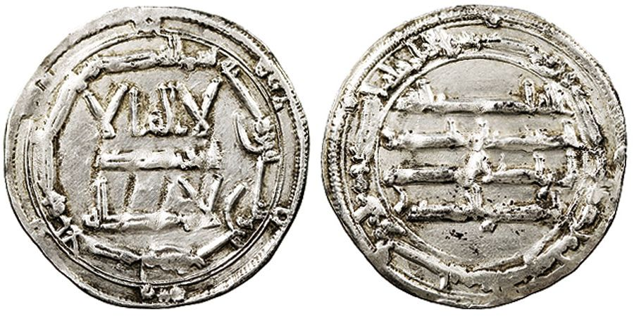 Dírham de Abd-ar-Rahman I. En plata. Any 162 de l'Hègira.